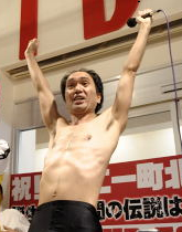 地方イベント参加時